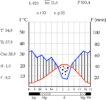 Diagrama ombrotérmico de León en La Virgen del Camino (España).